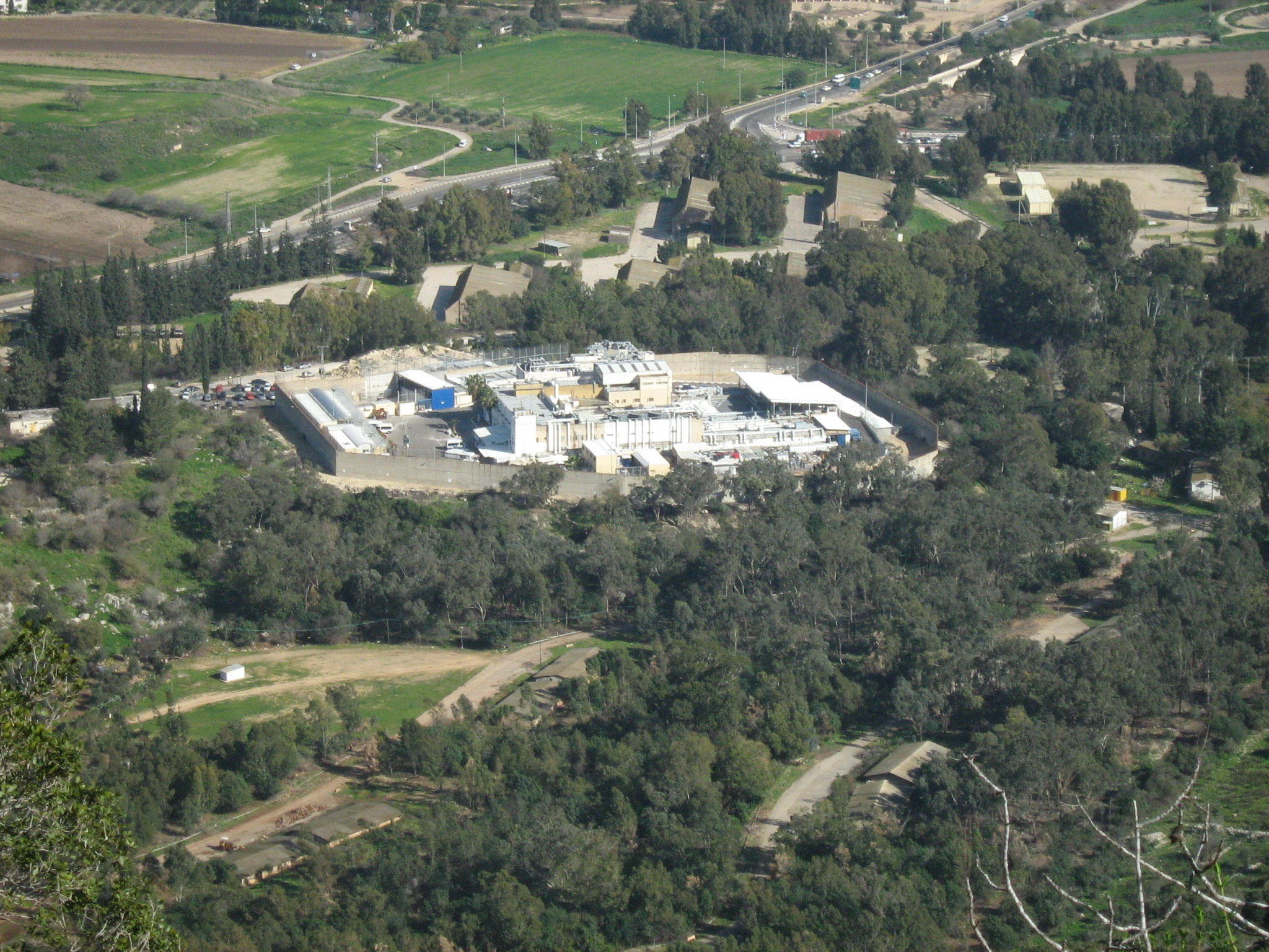 ג'למה. בית המעצר. וכבישים 70 ו-75 נפגשים בצומת העמקים